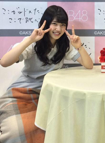 150506 유이리 샤메회 짤줍 (Yuiri Murayama)